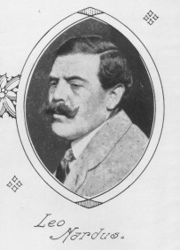 Portret van Leo Nardus